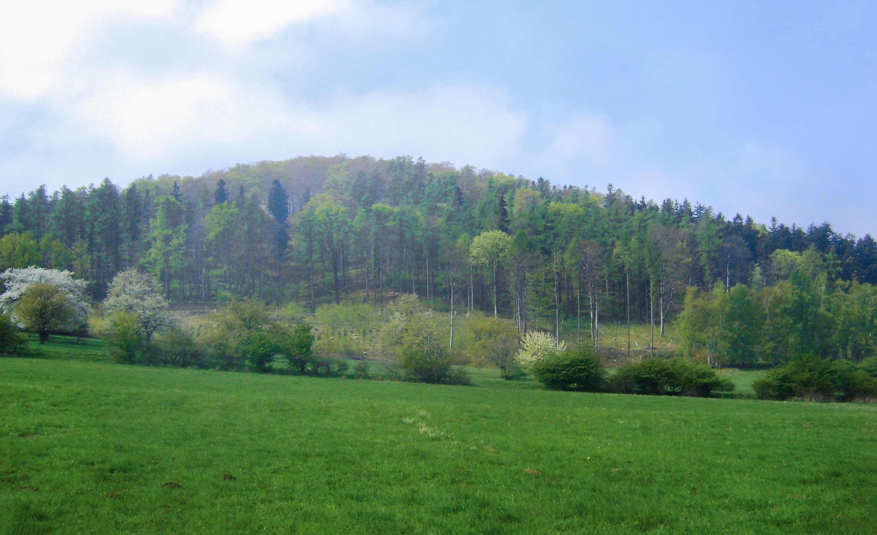 Wzniesienie w południowo-zachodniej Polsce, w Sudetach Środkowych, w środkowej części Gór Sowich.